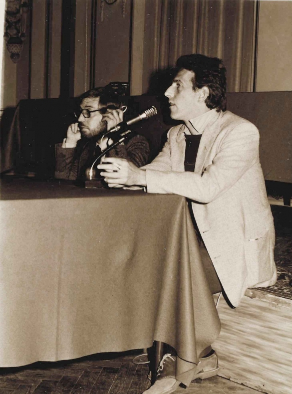 L'attore e regista statunitense Jim Mc Bride e Adriano Aprà